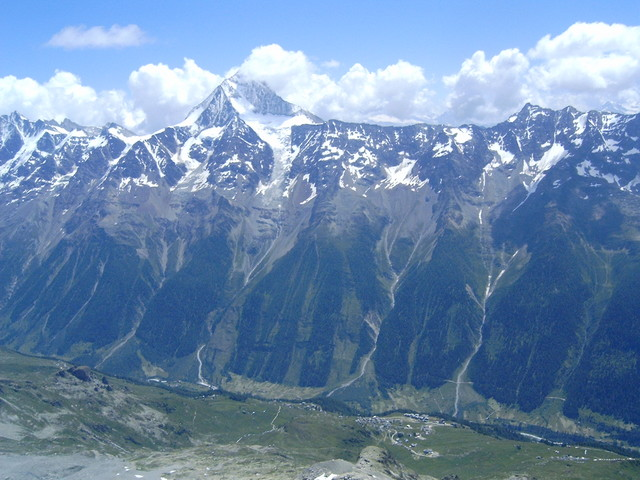 Beschreibung: Das Bietschhorn vom Hockenhorn aus gesehen.